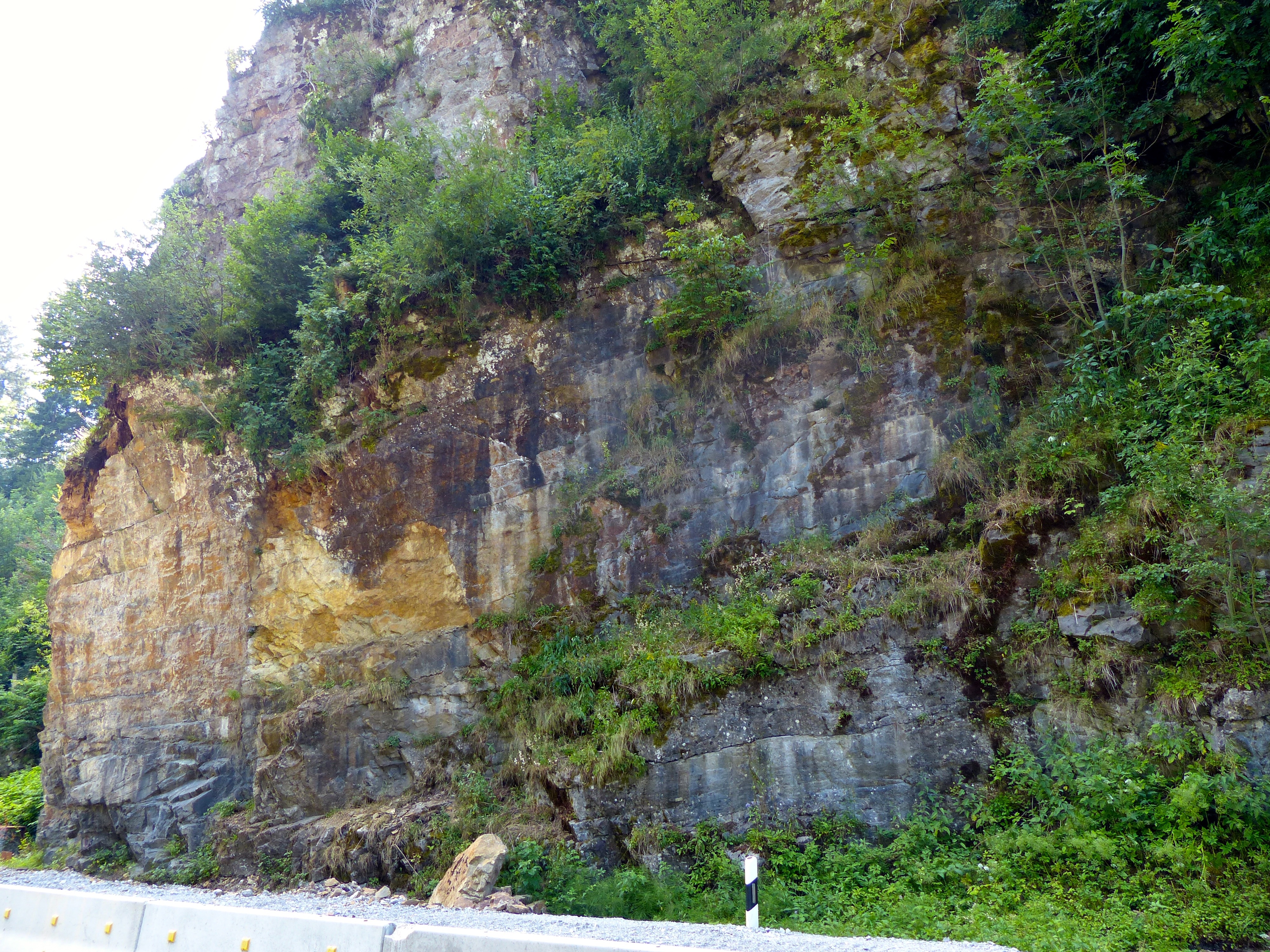 WikiProjekt Landstreiche:r Geotop Helvetikumaufschluss an der Breitachstraße